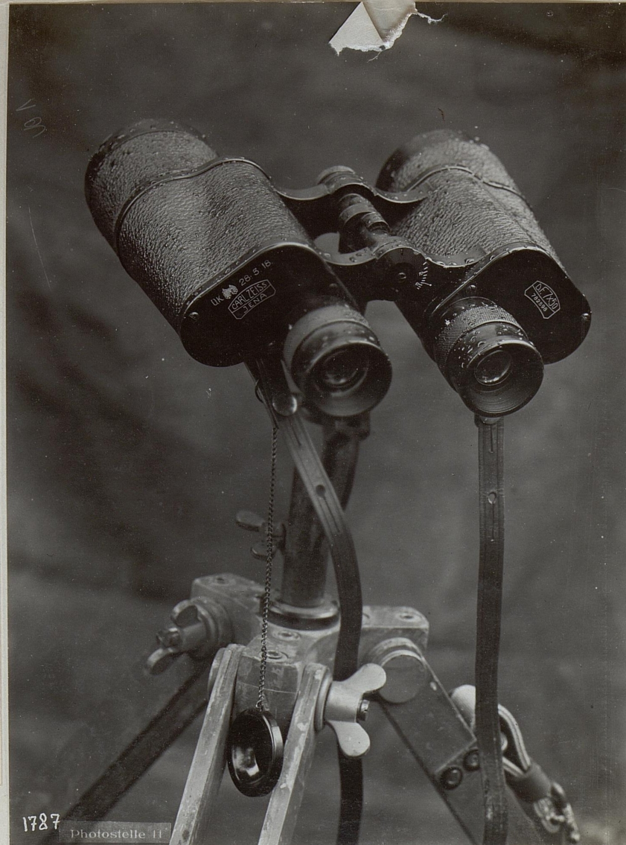 M.15 Z.7faches in Strichplatte komplt.Doppelfernrohr.